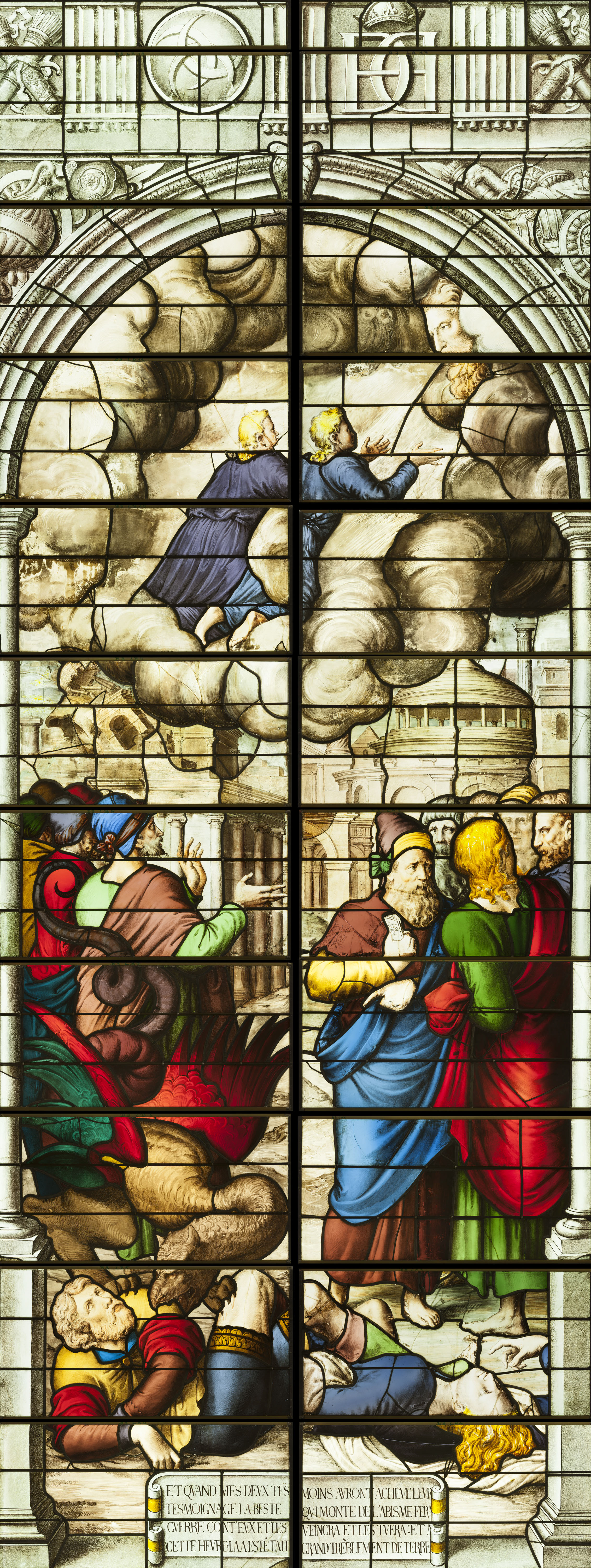 Panneau du registre supérieur de la baie 3 de l'abside.